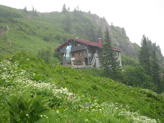 Hochgrat bei Oberstaufen